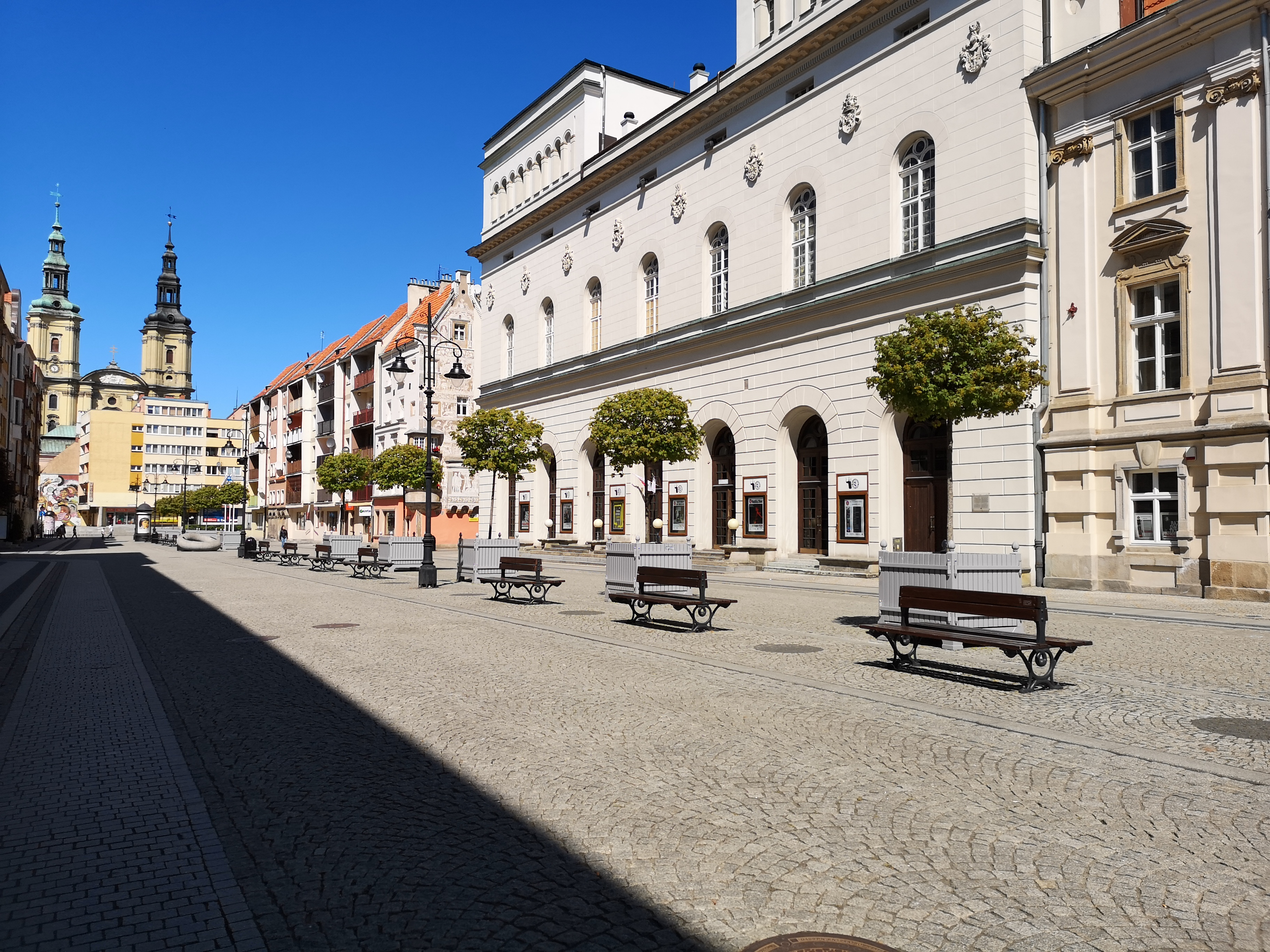 Gmach Teatru w Legnicy.